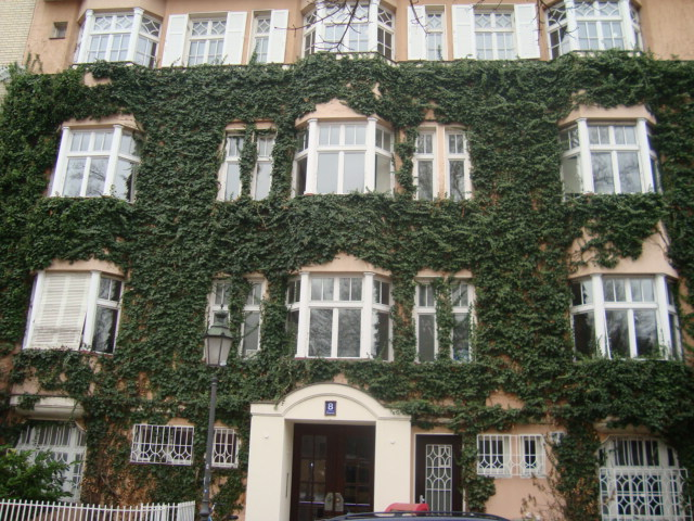 Wohnhaus Seestr. 8, München-Schwabing